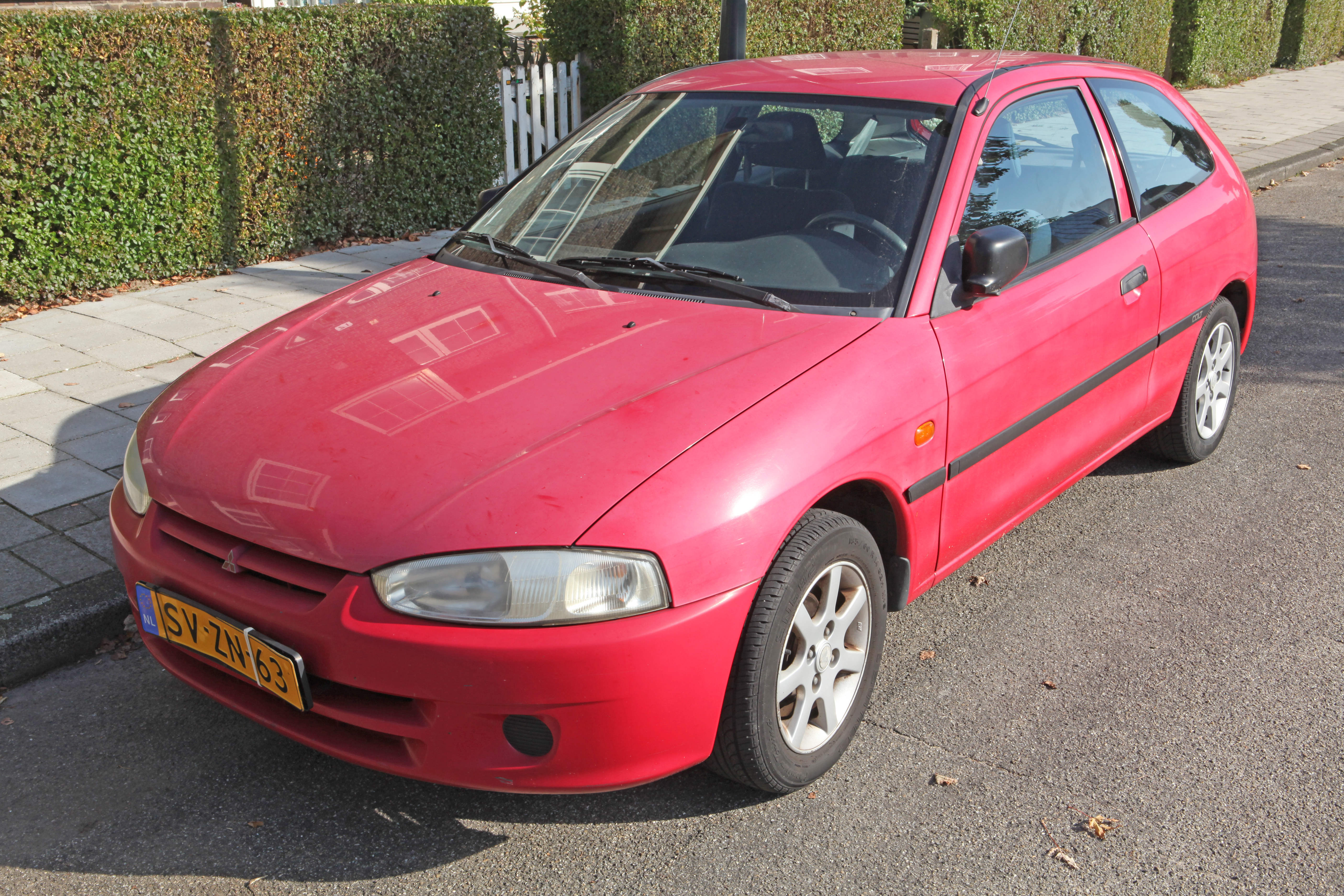 1998 Mitsubishi Colt 1.3 GLI